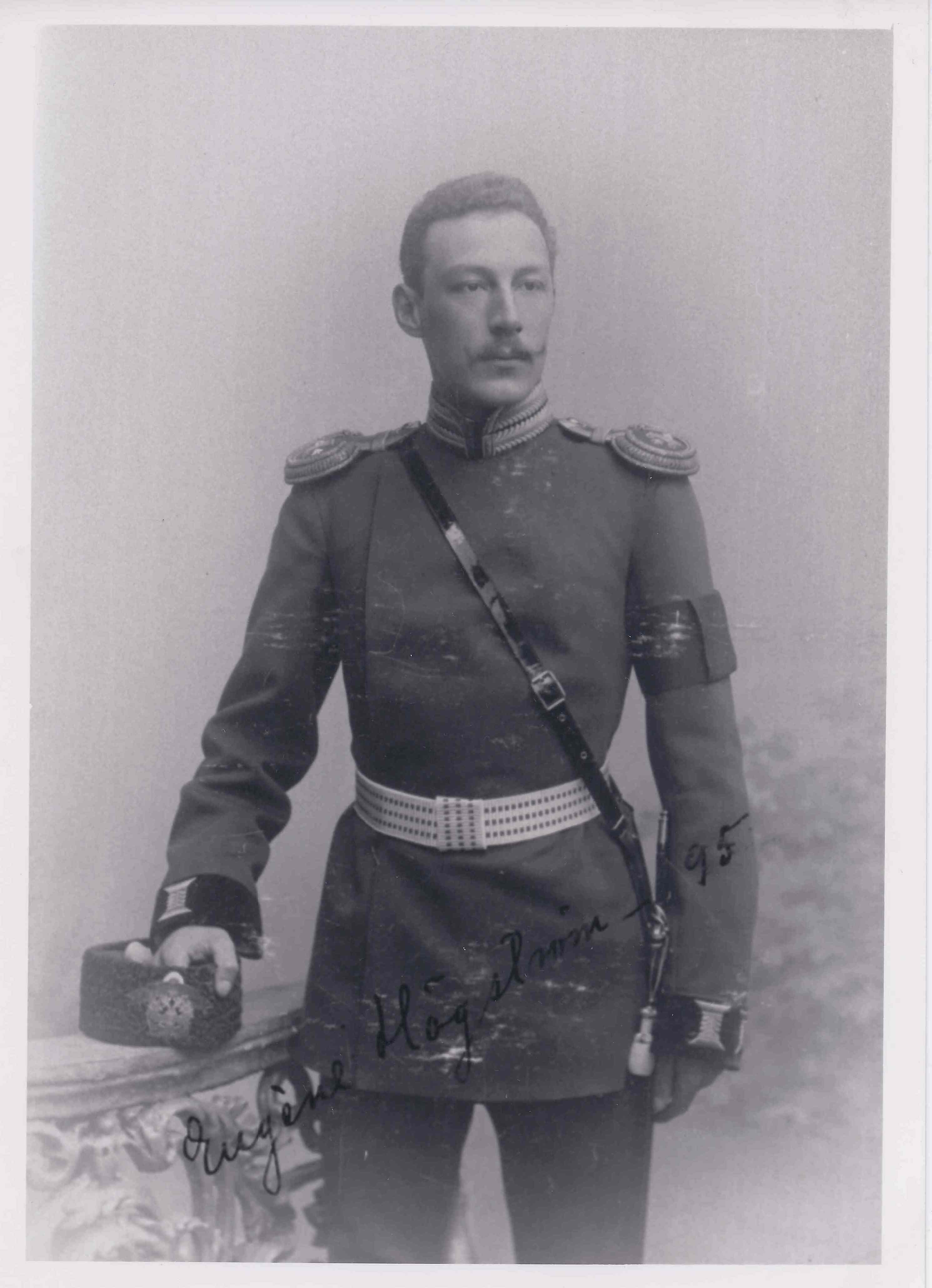 Graduate of Finland Military Academy, Haamina, Finland, 1895.